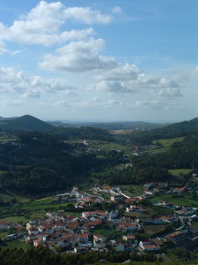 Vista geral da aldeia, a partir do Manique.